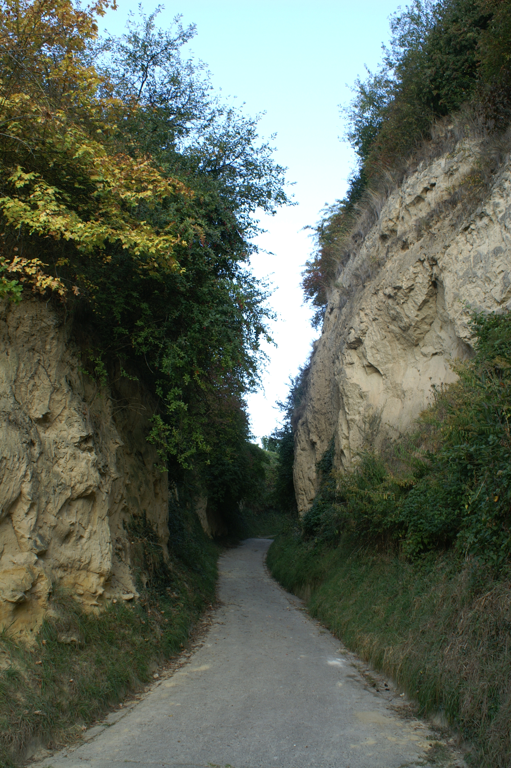 Lößhohlgasse Eichberg in Vogtsburg-Bickensohl im Kaiserstuhl. Die bis zum 15 Meter tiefe und 300 Meter lange Hohlgasse steht unter Naturschutz.